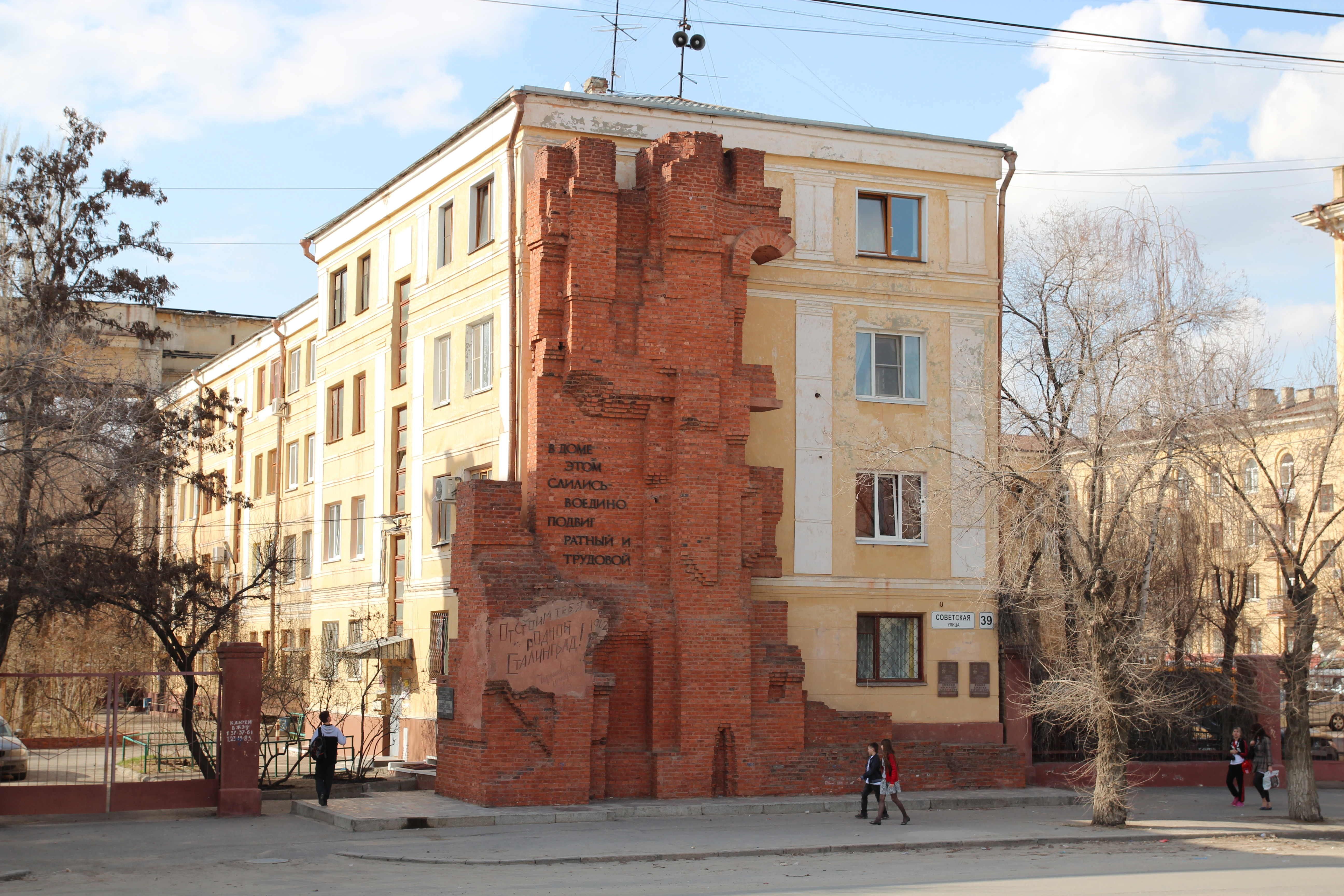 Дом Павлова